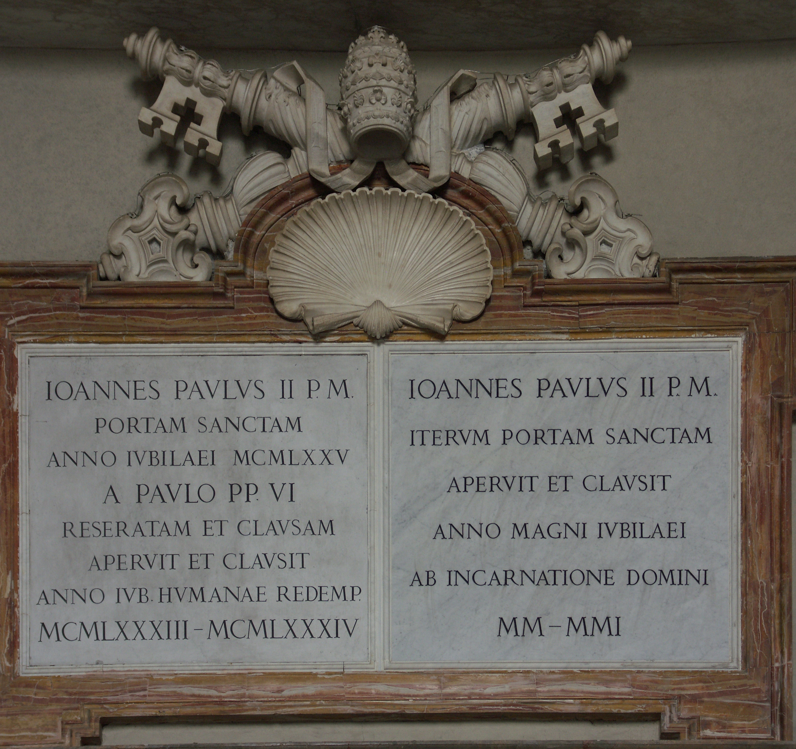 Rom, San Giovanni in Laterano, Heilige Pforte, Inschrift